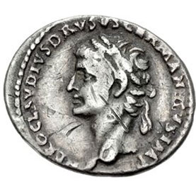 Изображение Нерона Клавдия Друза на монете с сайта